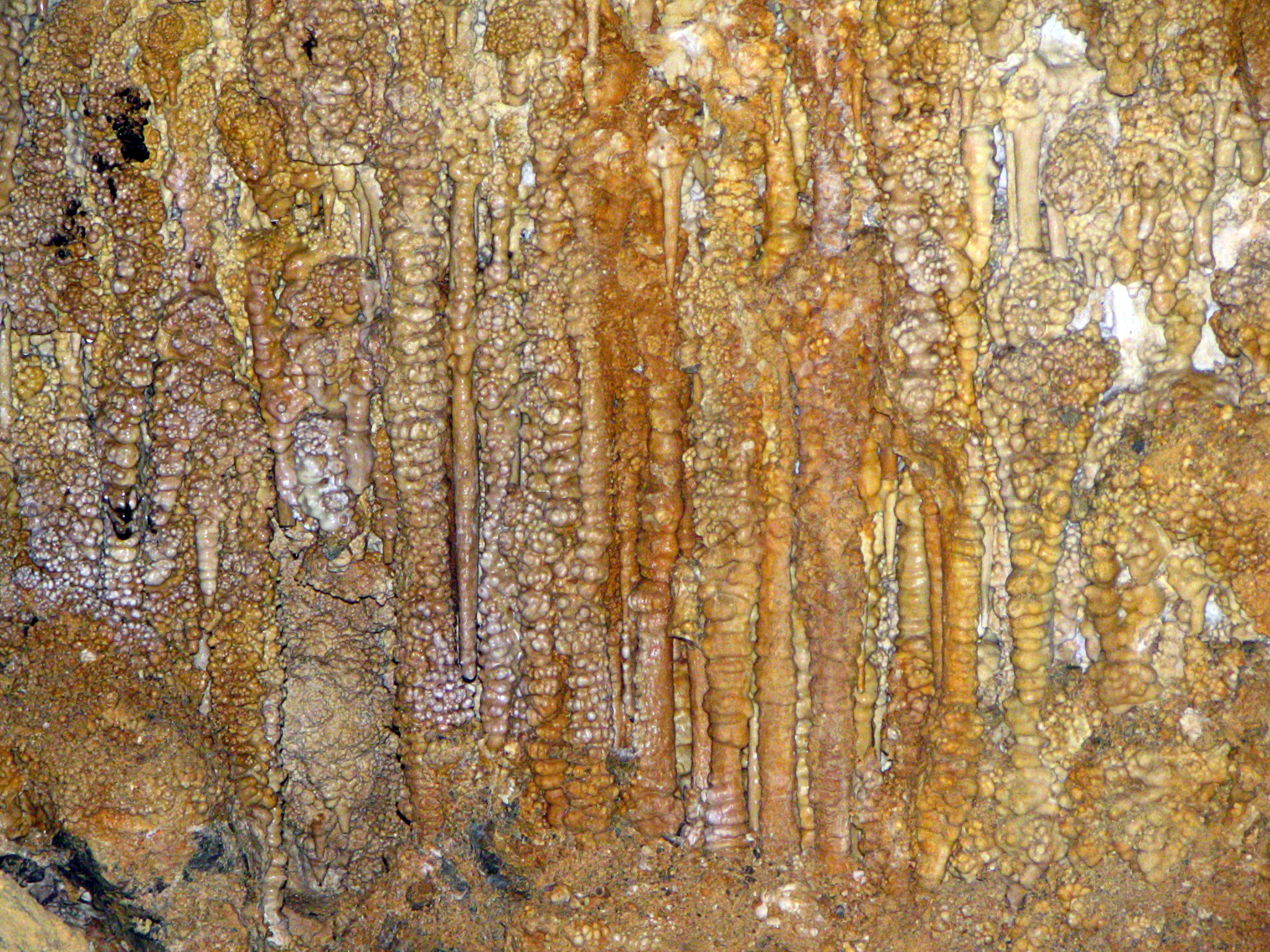 Пећински украси у Рисовачи (фото: Михаило Грбић, 21.10.2006.)